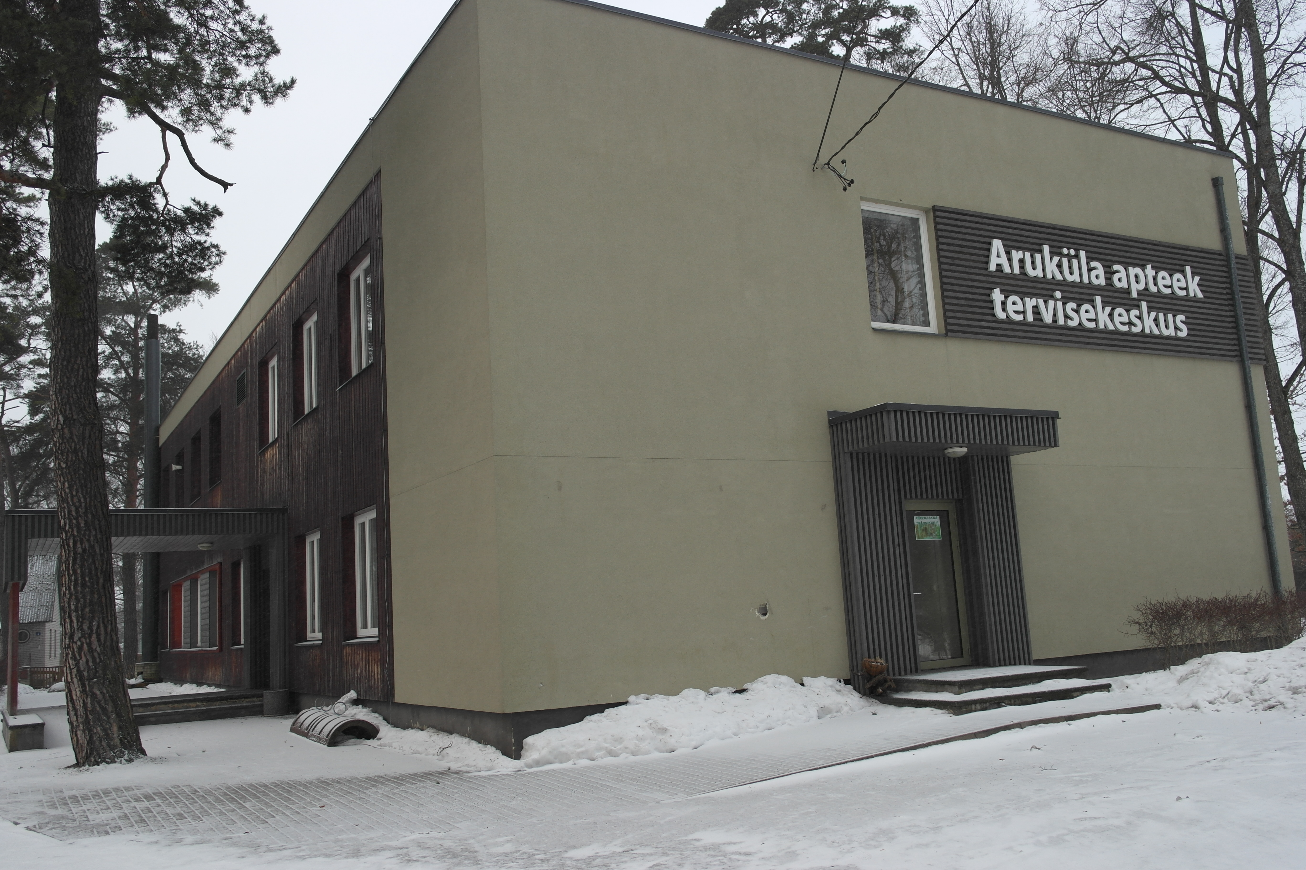 Aruküla ambulatoorium.